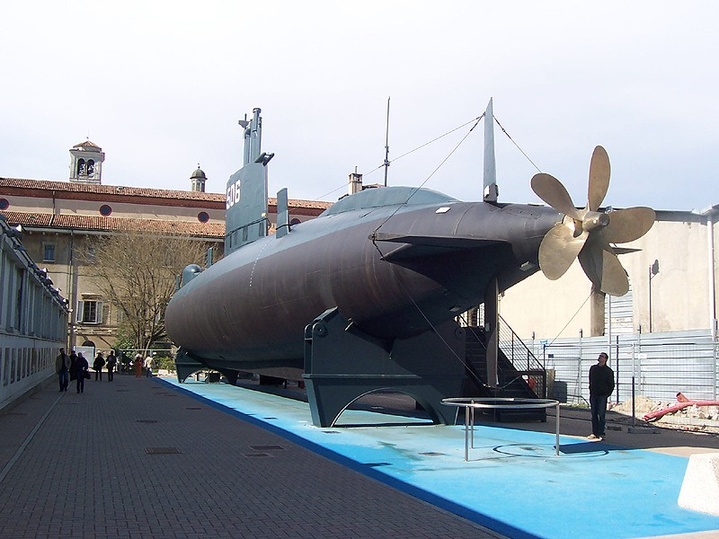 Milano - Sottomarino Toti al Museo della Scienza e della Tecnica "Leonardo da Vinci"